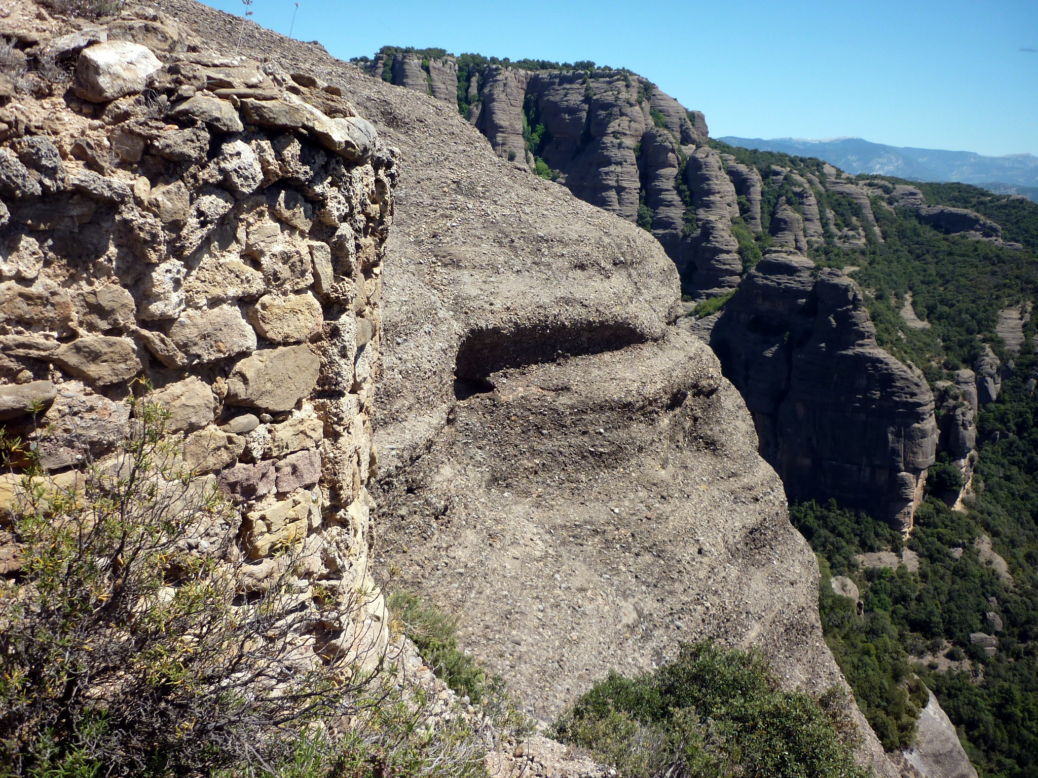 Absis de Sant Salvador del Corb (Peramola) abocada al cingle. Al fons, les Roques de Sant Honorat This is a a photo of a natural area in Catalonia, Spain, with id: ES510175